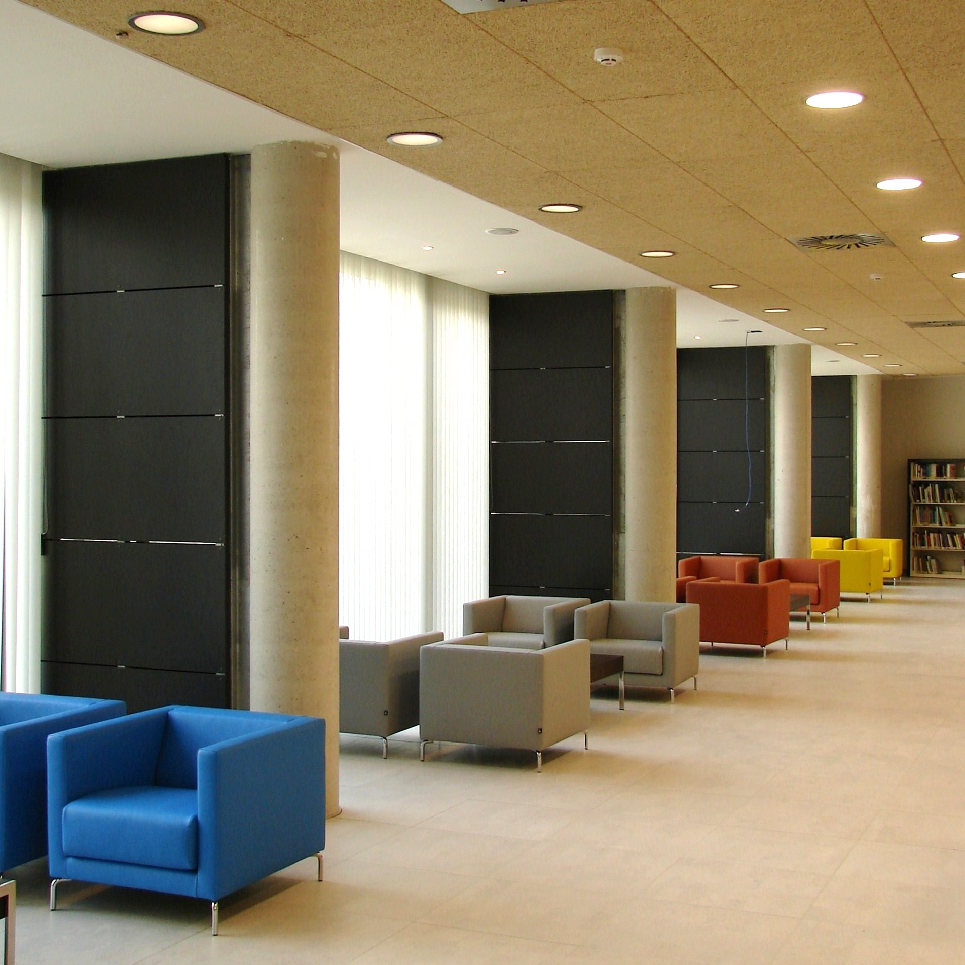 Biblioteca Municipal - Public Library - Lope de Vega (Tres Cantos) -Madrid